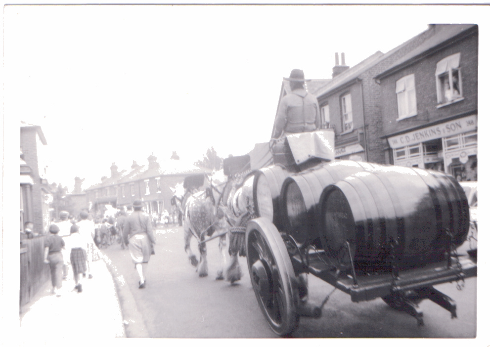 Drayman 1940's